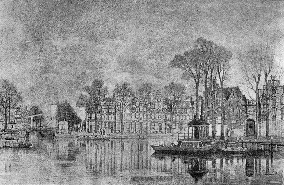 Amsterdam